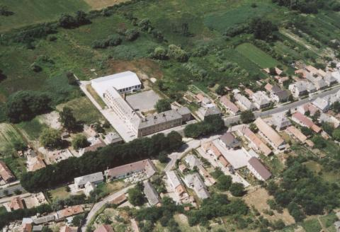 Panoramo de Bakonyszombathely.